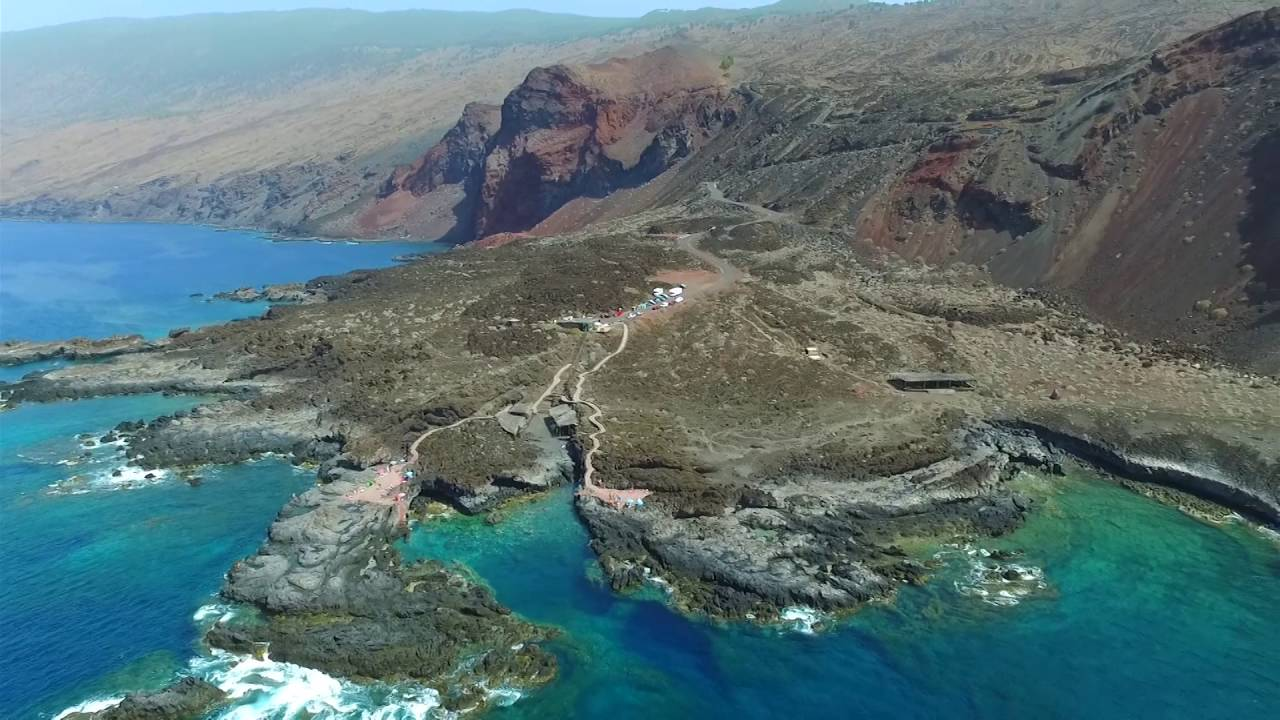 Vista de la región de Tacorón en la zona suroesta de la isla de El Hierro